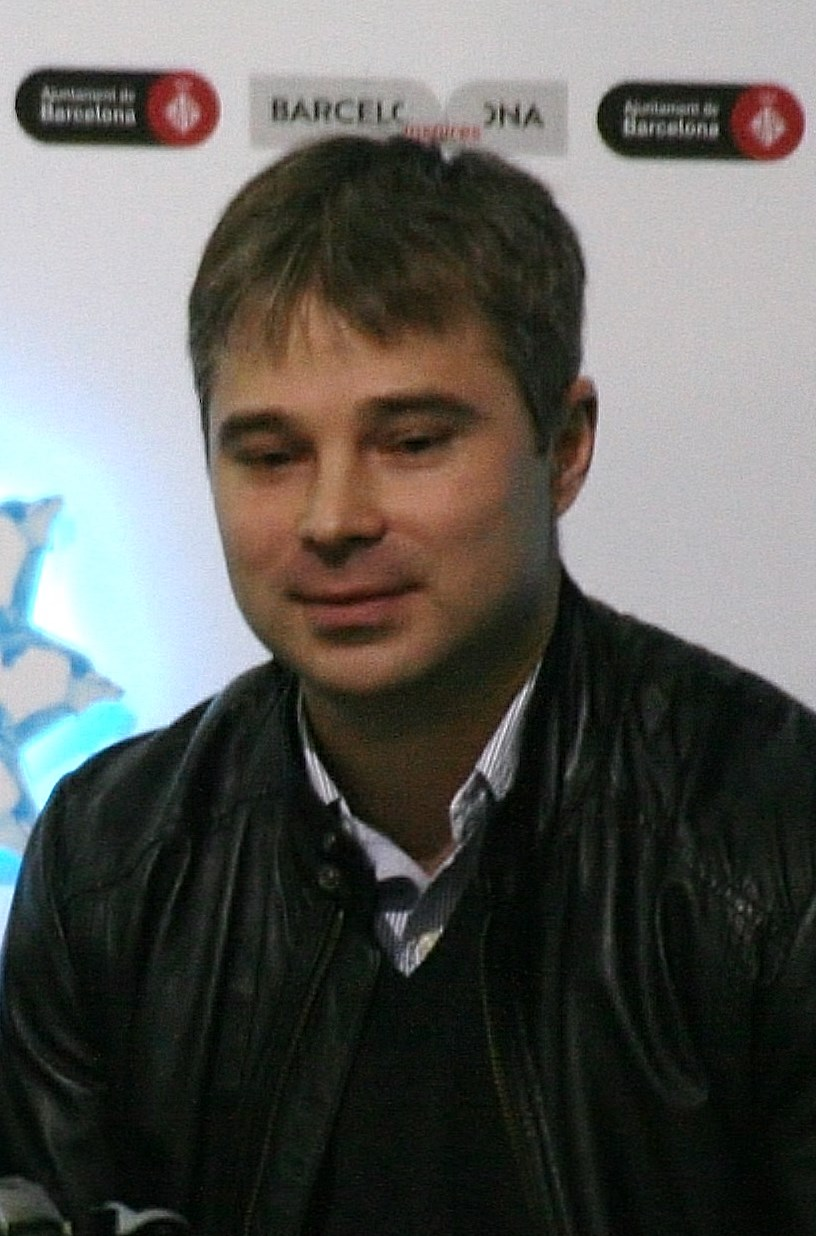 Лина Фёдорова и Максим Мирошкин (Россия) на финале Гран-при среди юниоров 2014-2015.